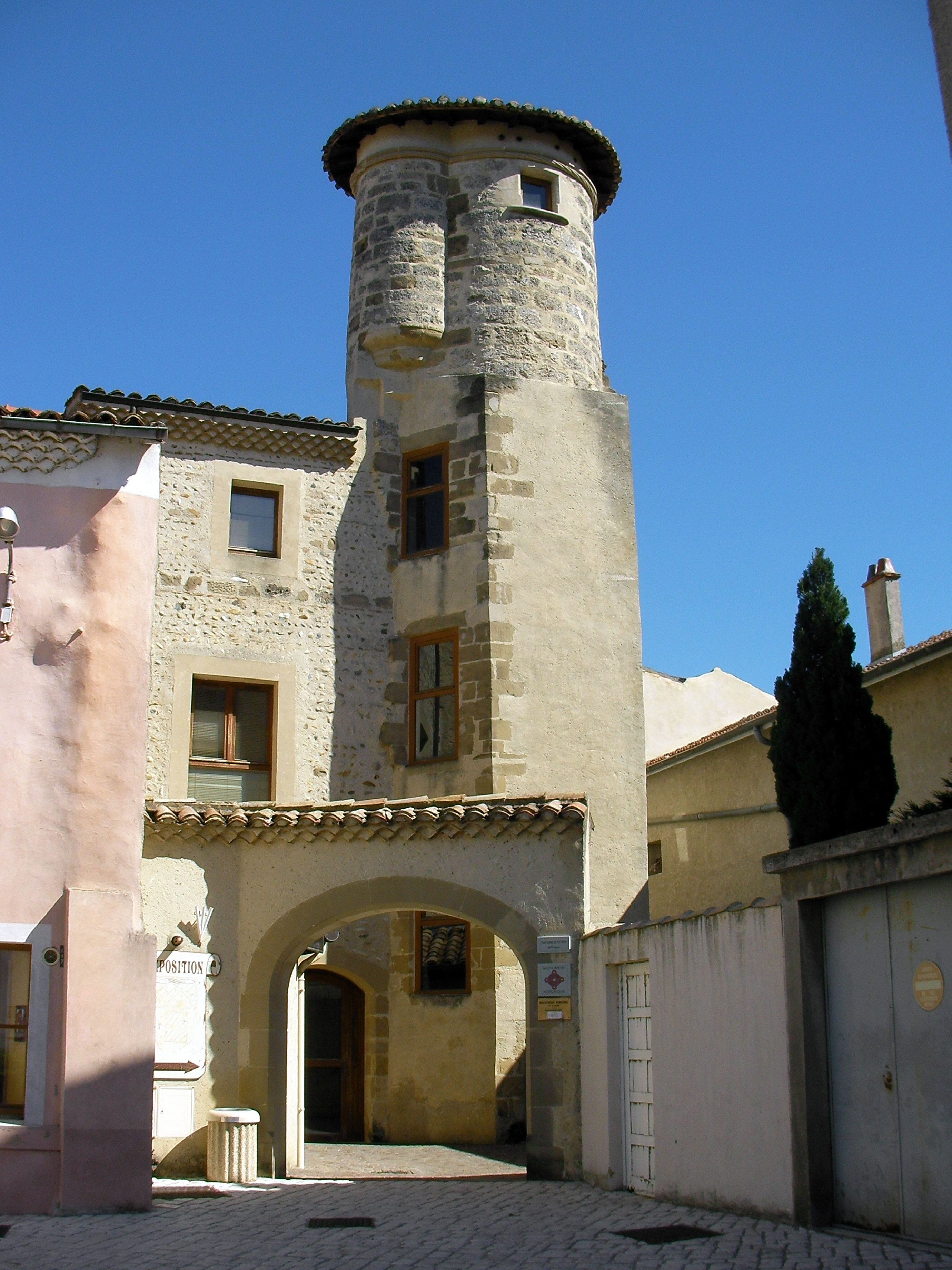 La tour Diane de Poitiers à La Roche de Glun (drôme / France)